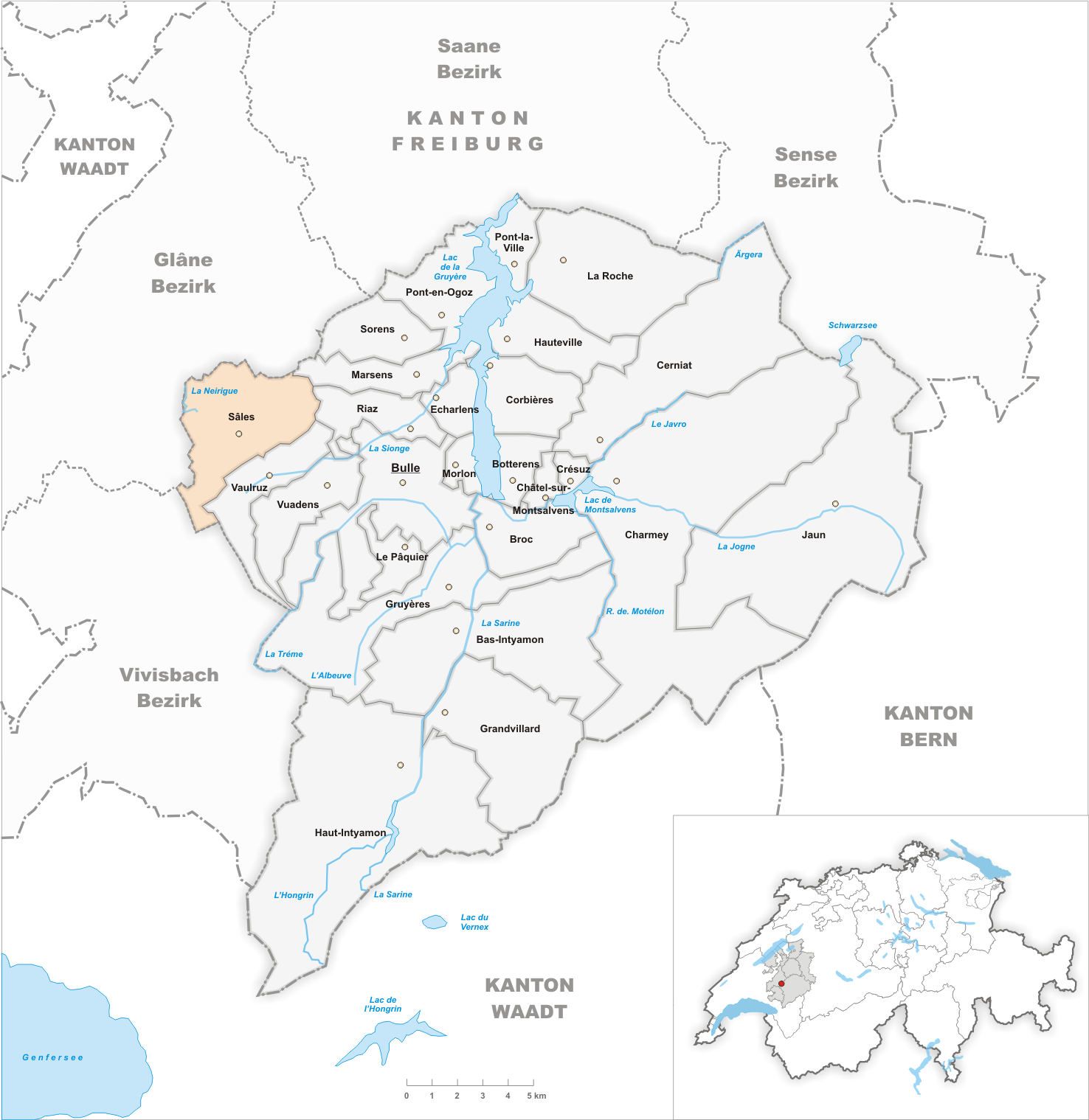 Municipality Sâles